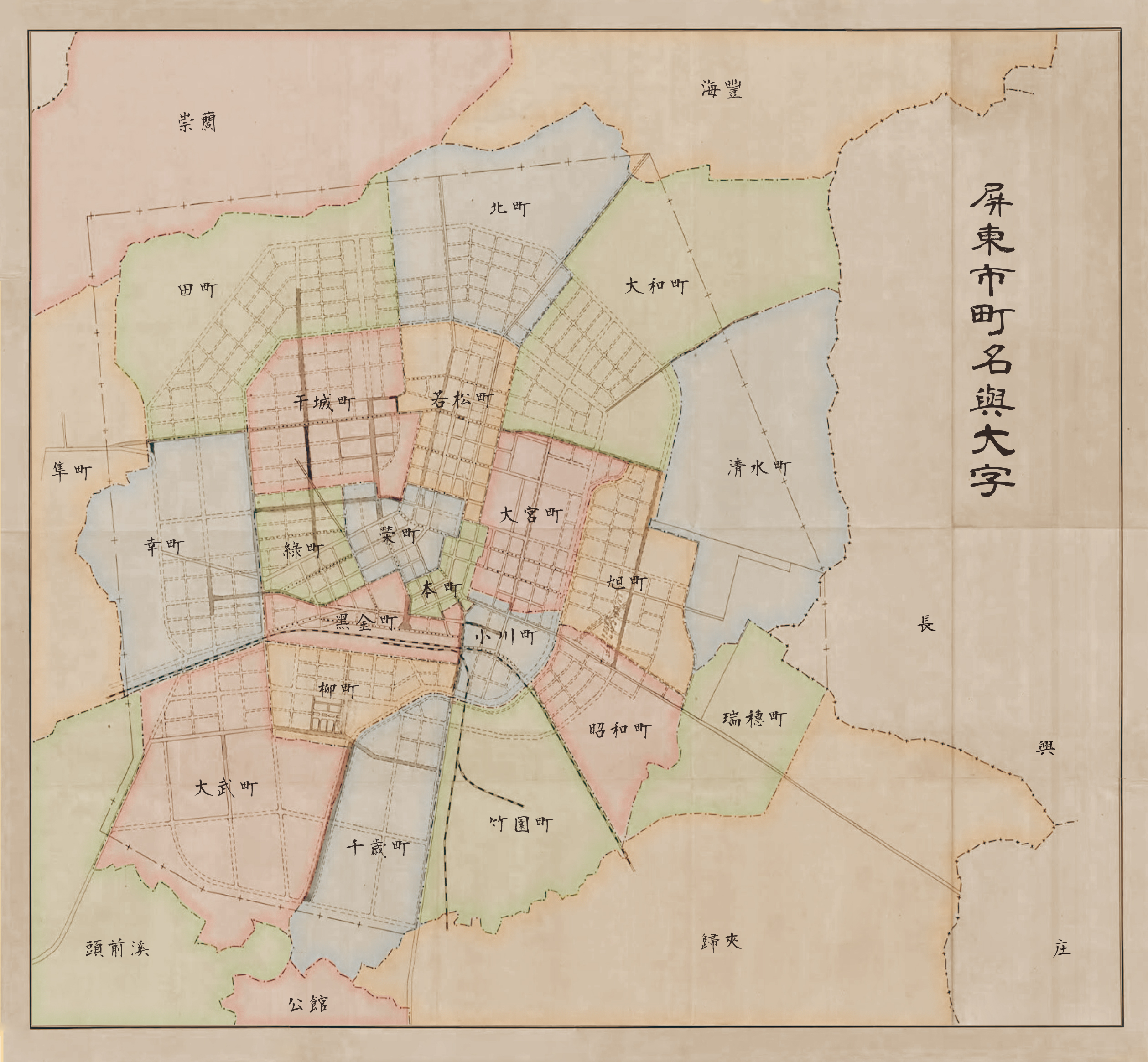 中文（台灣）: 台灣屏東市於1939年4月實施町名改正後的行政區劃